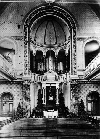 Große Synagoge Erfurt innen